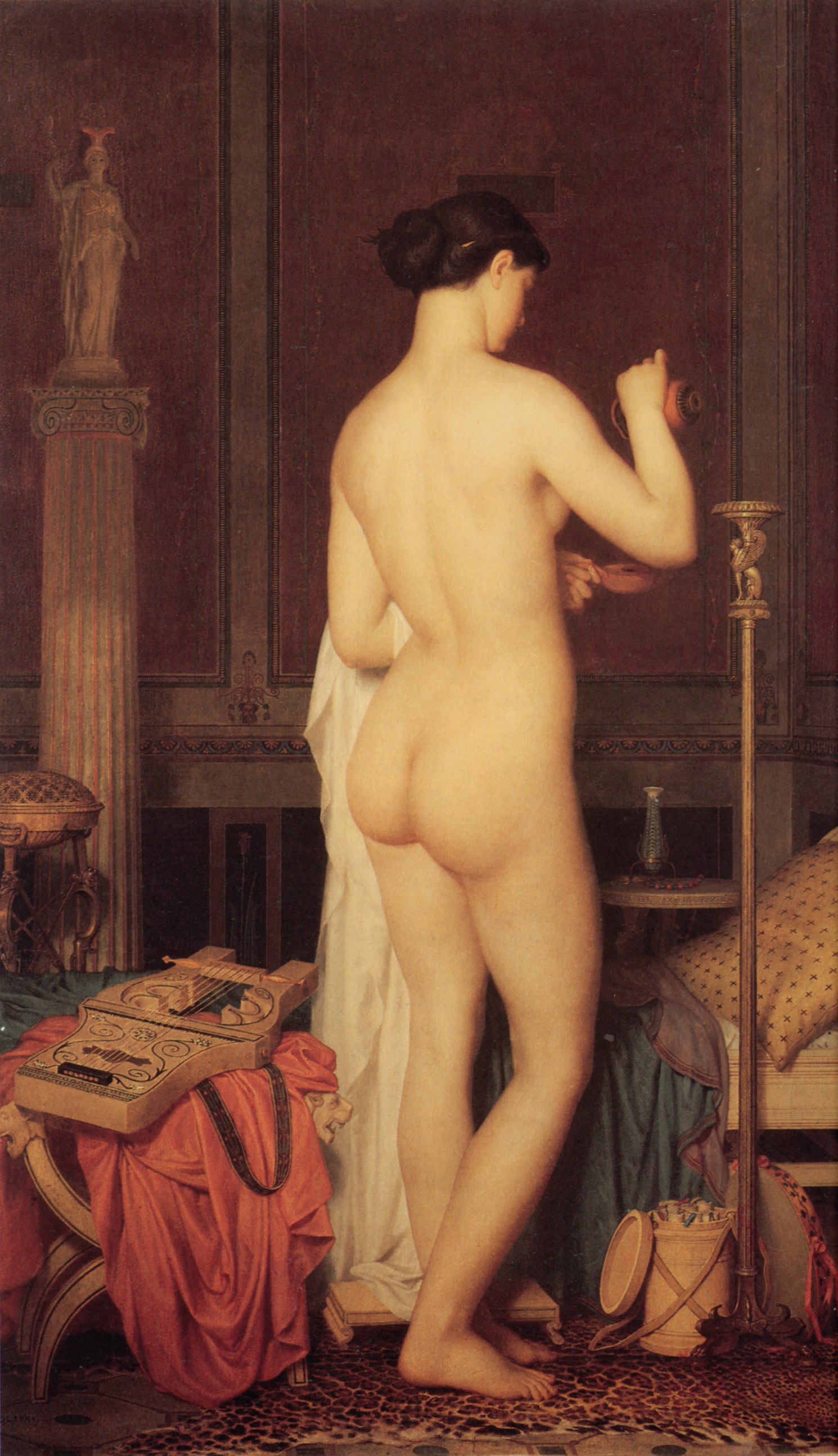 Le coucher de Sappho